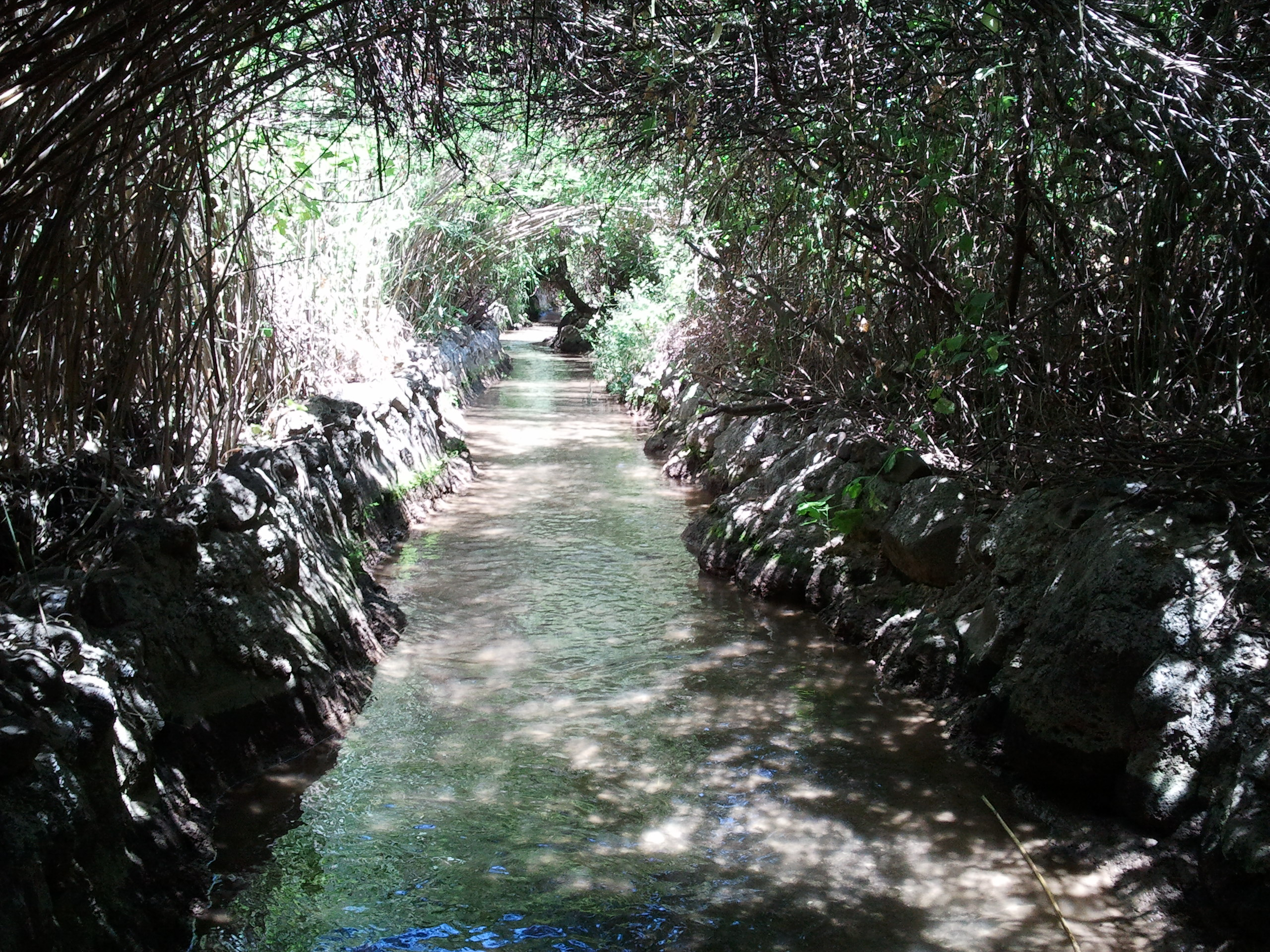 Category:Jordan River park, northern from Sea of Galilee, Israel פארק הירדן שוכן בצפונה של הכנרת. בתחום הפארק נמצא תל בית צידה אמת המים